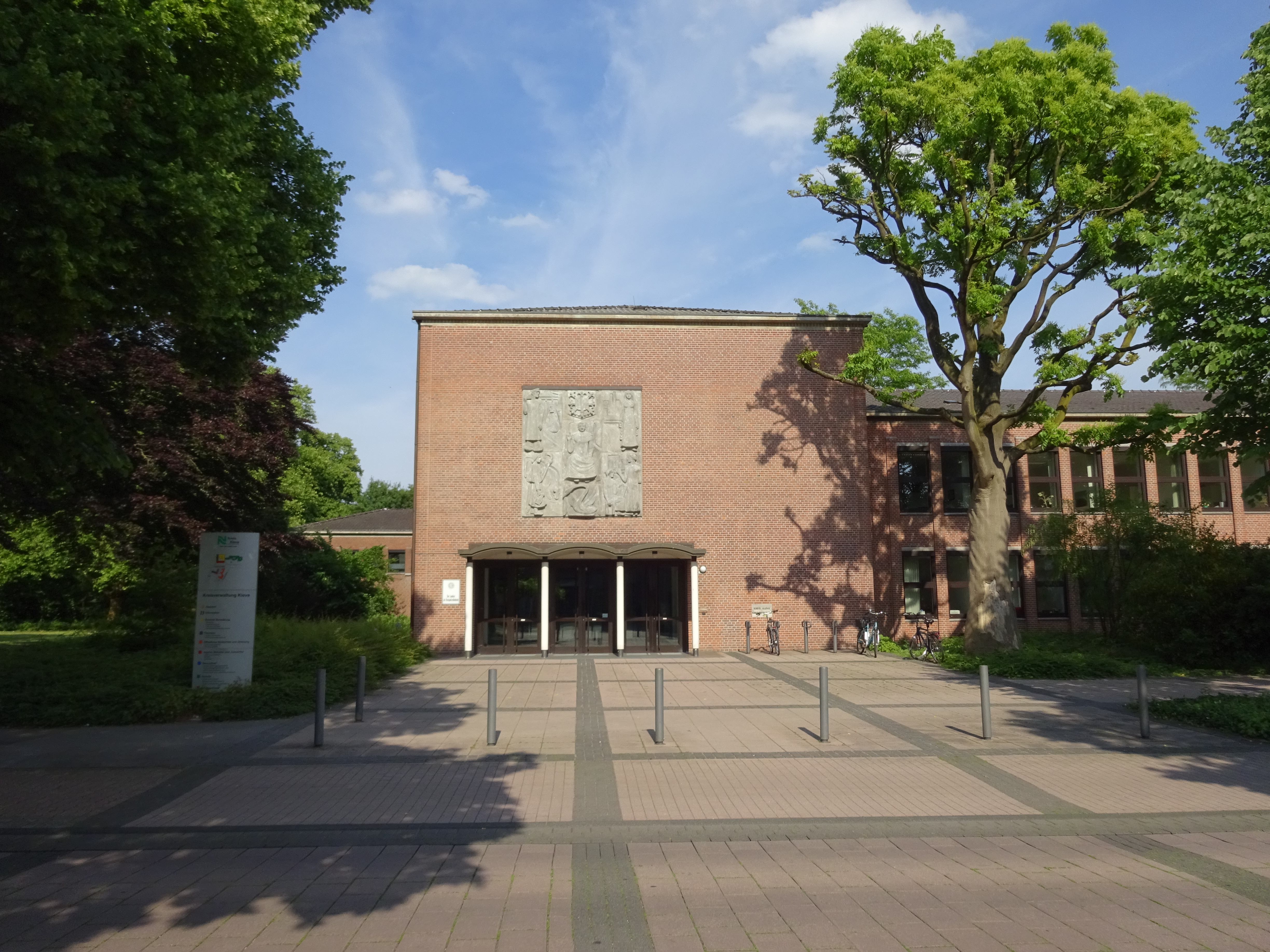 Kreisverwaltung Kleve, Nassauerallee 15-23